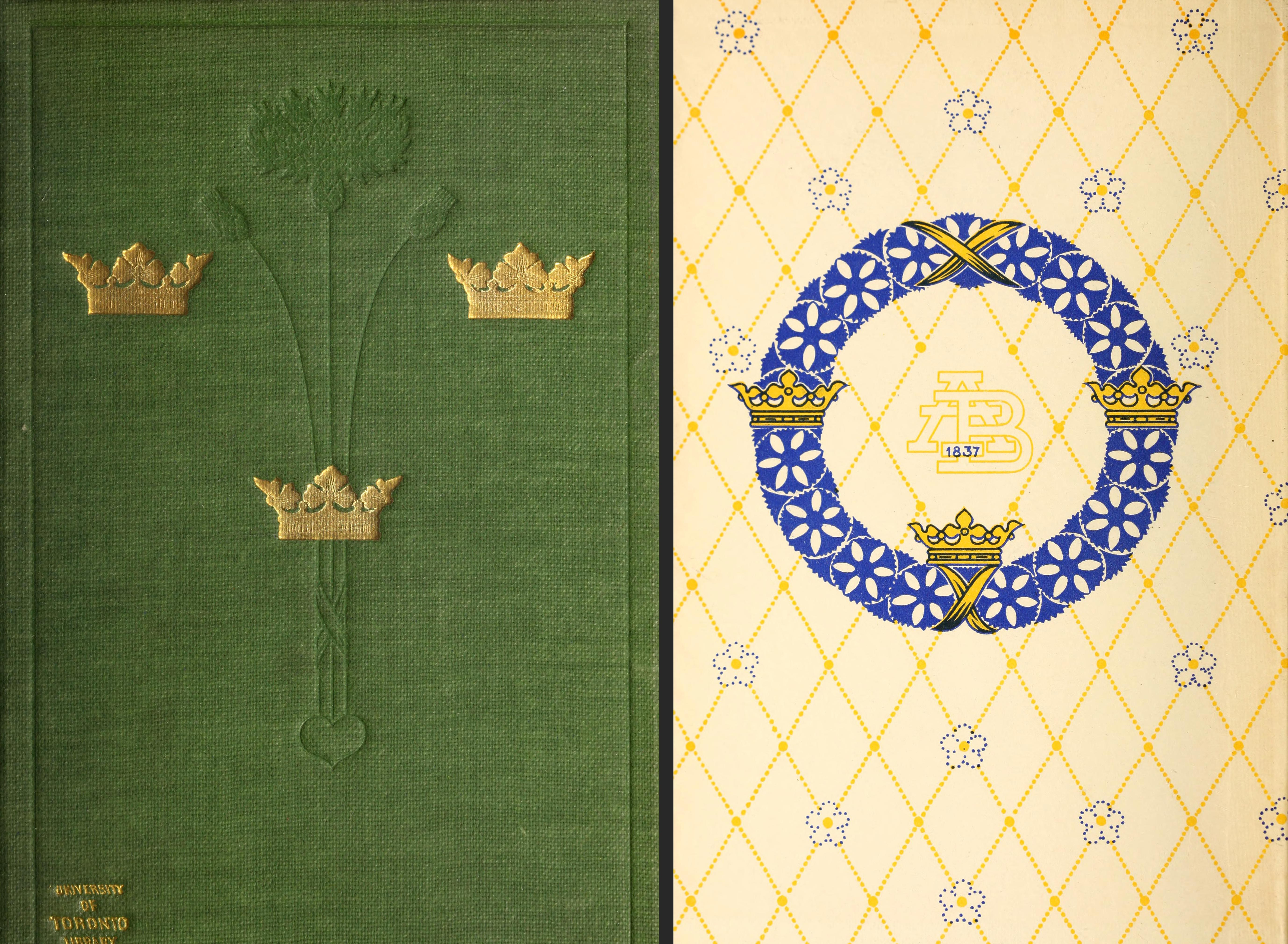 Sveriges national-litteratur 1500-1900. Cover and endpaper